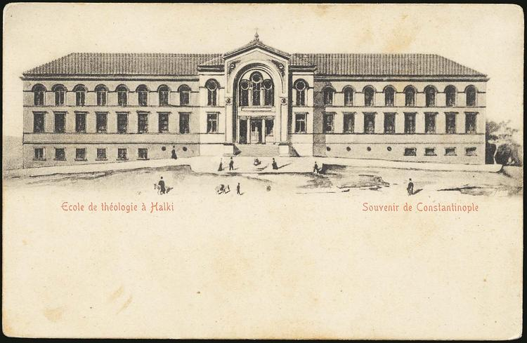 Семинарията в Халки